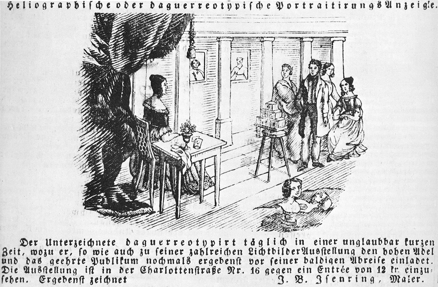 Werbeanzeige Wanderdaguerreotypisten Johann Baptist Isenring in Stuttgart. Gleichzeitige Verwendung von sechs Kameras für mehrere gleiche Daguerreotypien. (Anzeige in der „Schwäbischen Chronik“, 31. Mai 1841, Holzschnitt)